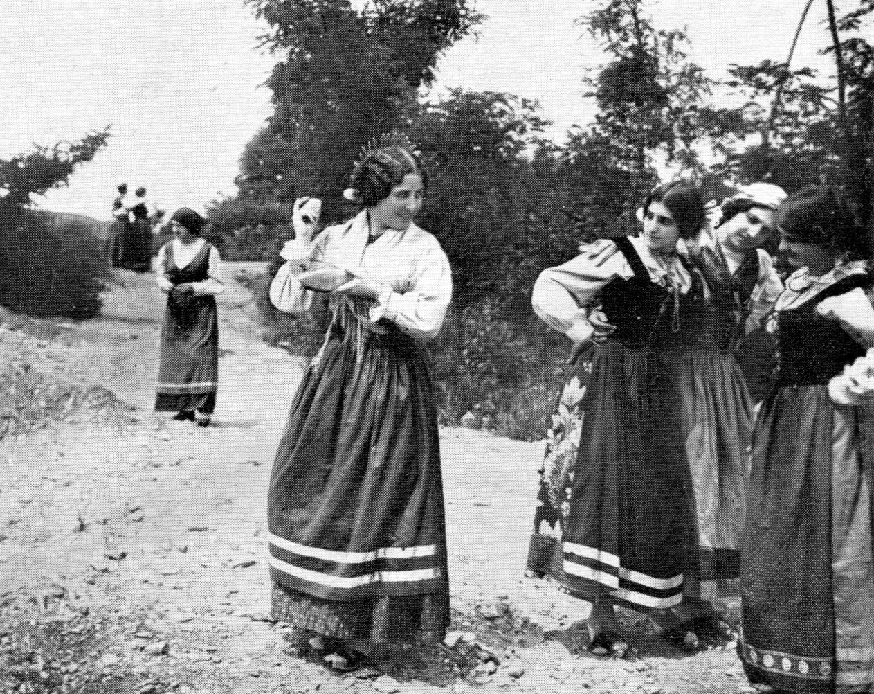 Gigetta Morano interpreta Lucia Mondella ne I promessi sposi versione "Ambrosio", regia E. Rodolfi (1913)